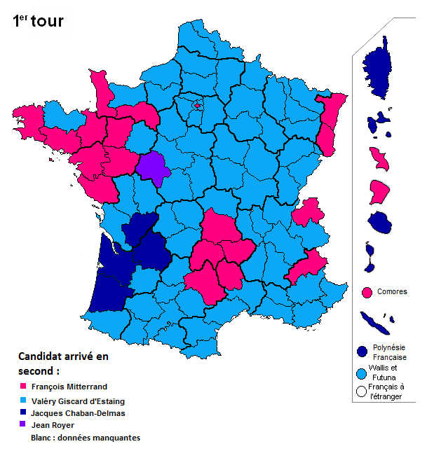 Candidat arrivé second du 1er tour des élections présidentielles françaises de 1974, département par département